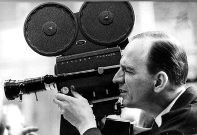 Ingmar Bergman filming 1965.